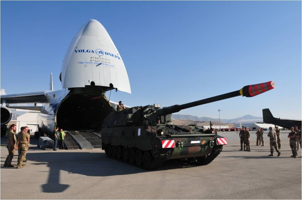 Ankunft PzH2000 in Mazar e Sharif bei Ausfahrt aus Antonov